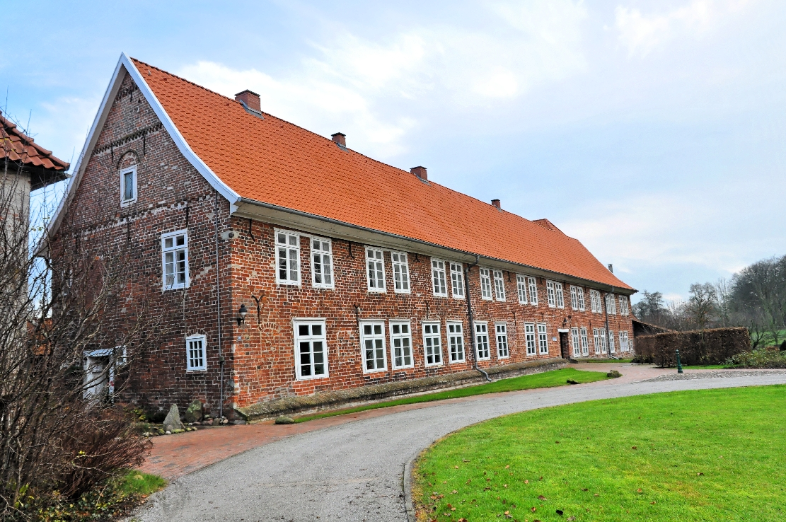 Neuenwalde 2012